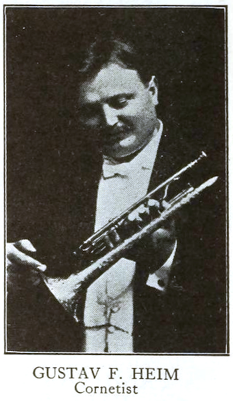 Gustav Heim, Cornettist